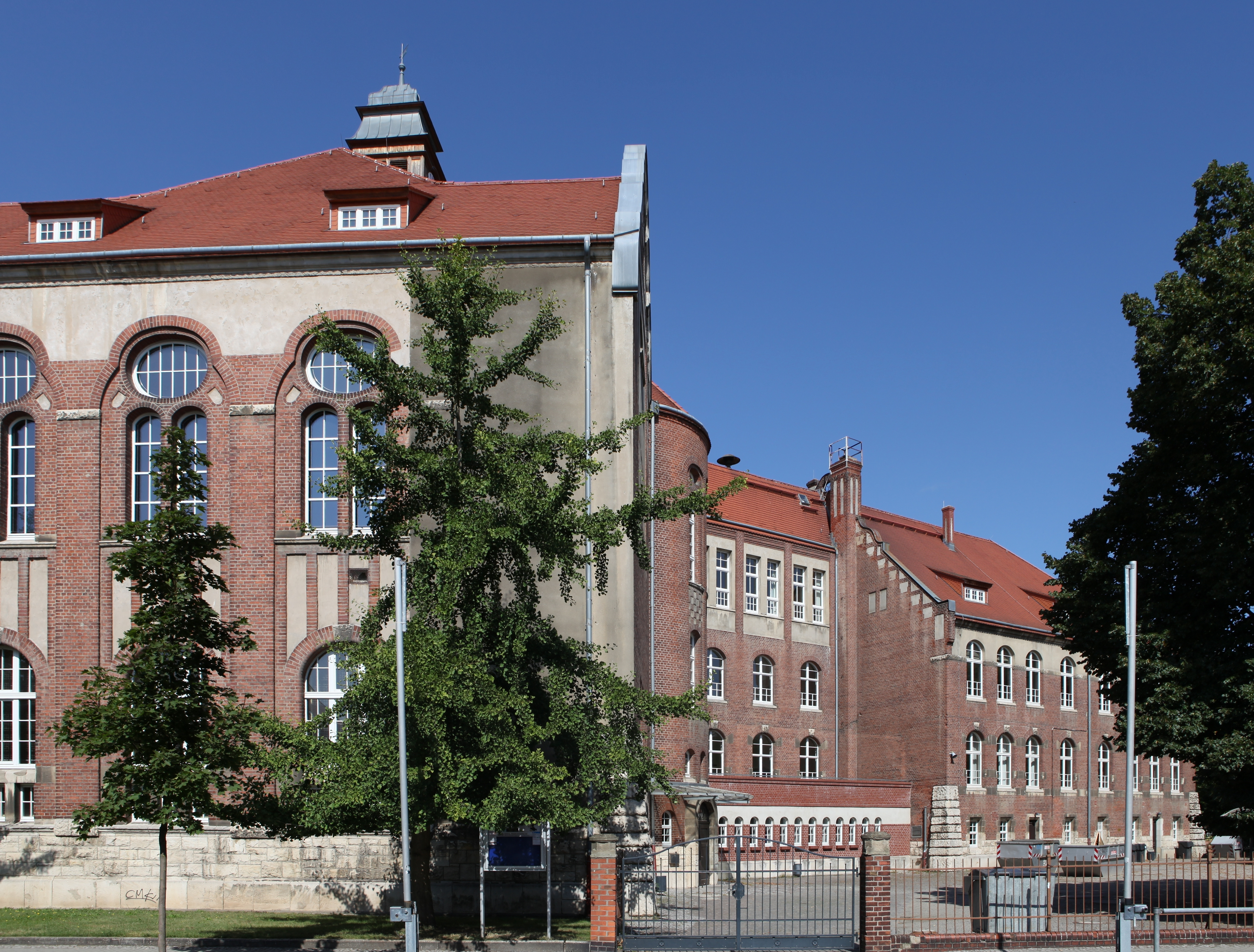 Kulturdenkmal Schule Dr.-Külz-Ring 9 in Eilenburg; Objektnummer: 08973325